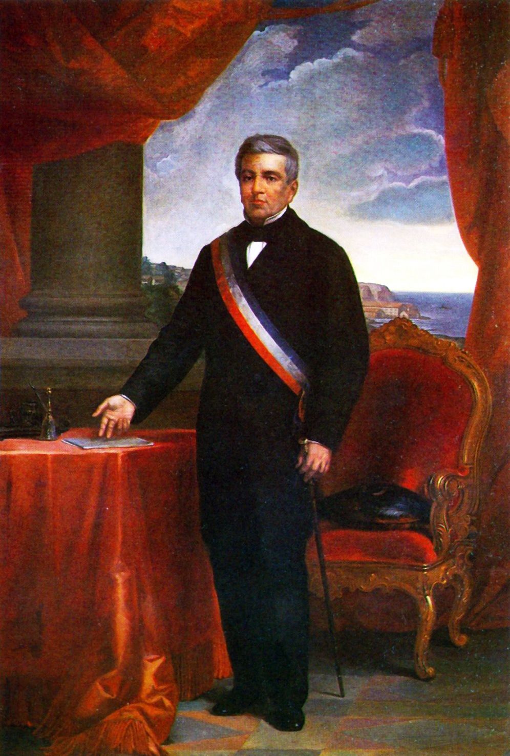 Segundo retrato oficial de Manuel Montt.